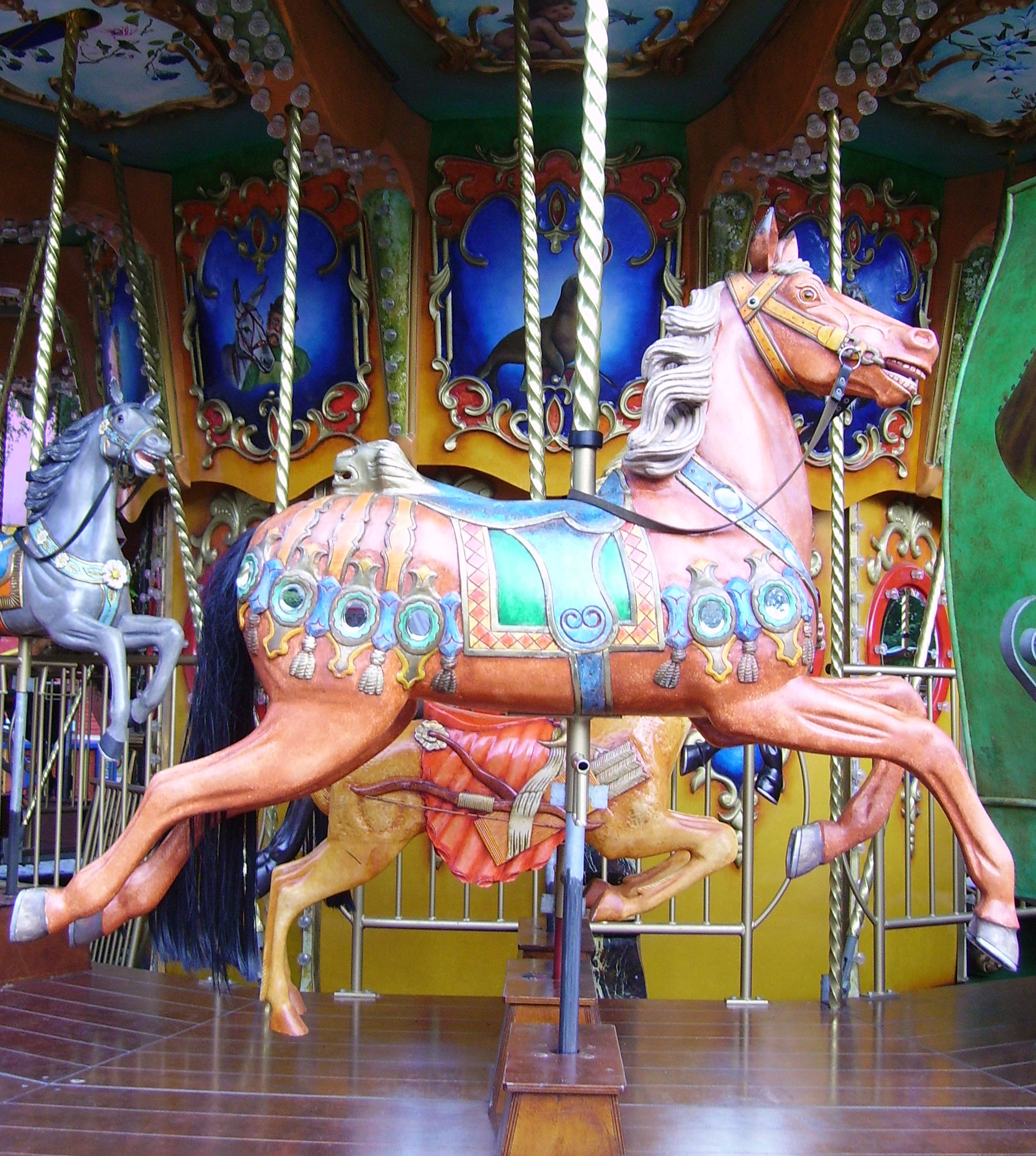 Freizeit-Land Geiselwind near Geiselwind in Franconia (Germany)